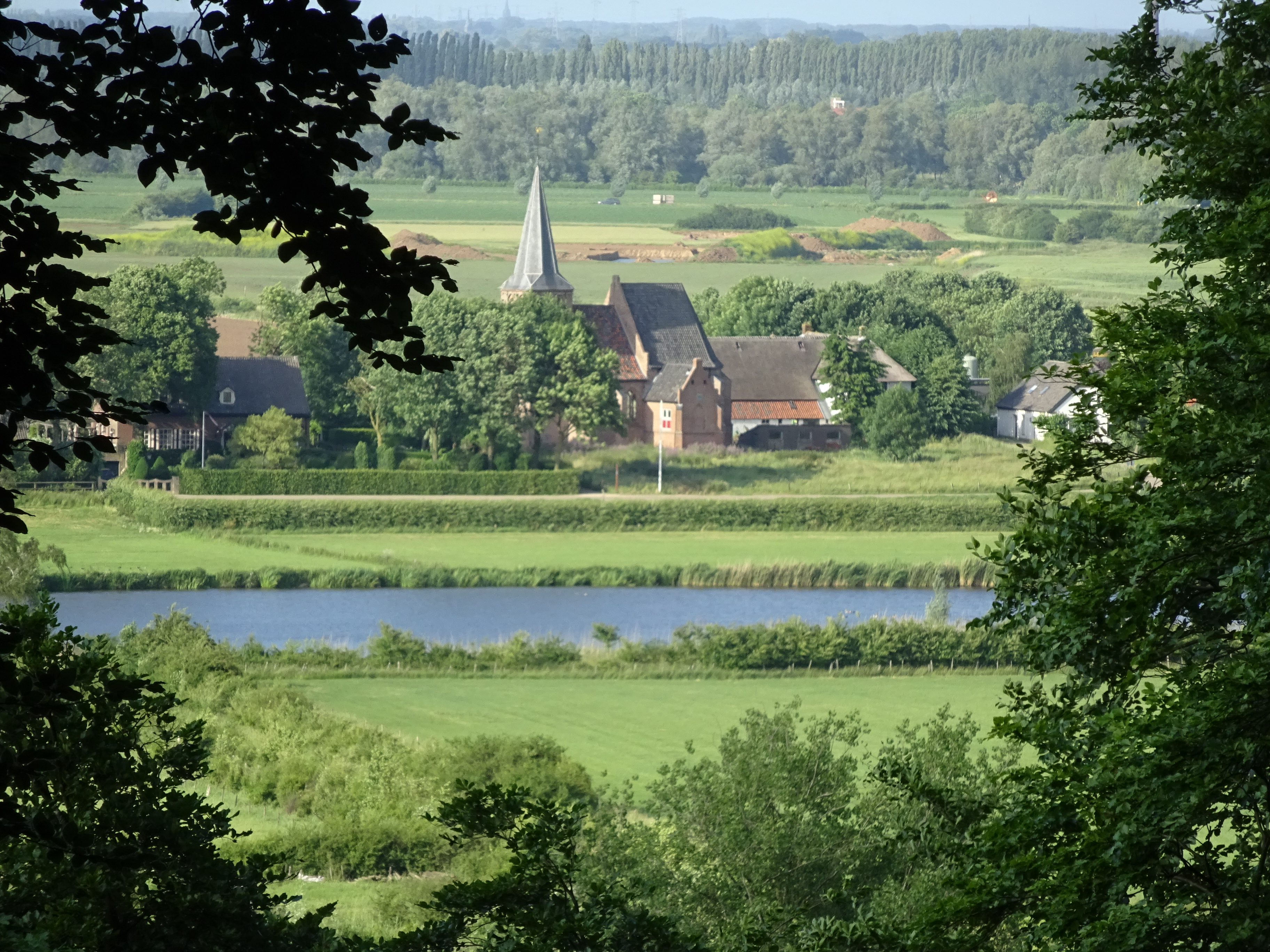 Uitzicht op de Düffelt; Persingen met Sint Joriskapel